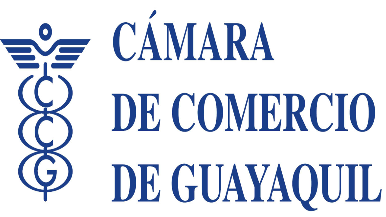 La Cámara de Comercio es una organización formada por personas naturales como empresarios o dueños de pequeños, medianos o grandes comercios con la finalidad de incrementar la productividad del país o de la ciudad en la que se encuentre.